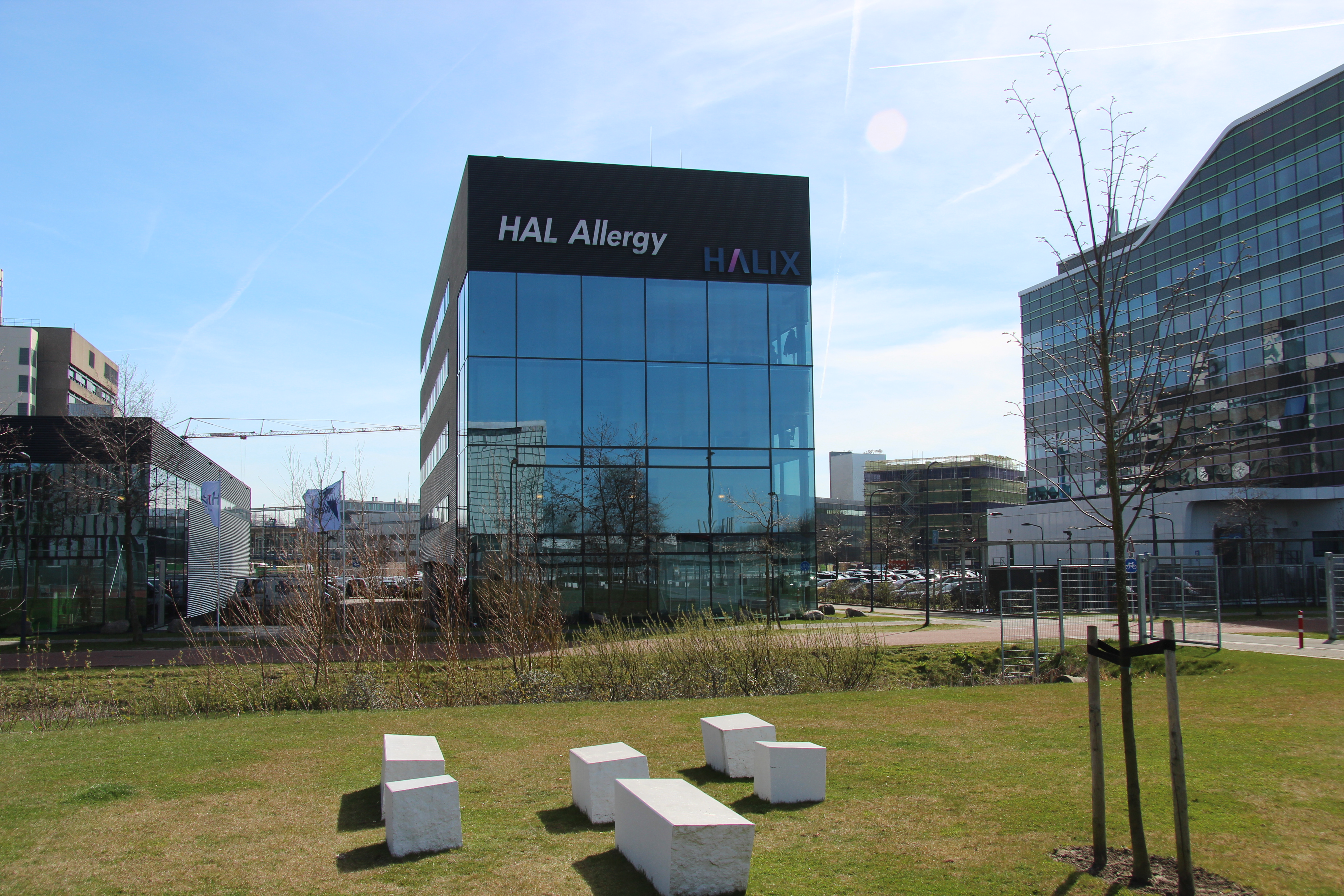 HAL Allergy Group, J.H. Oortweg 15-17, 2333 CH Leiden, The Netherlands